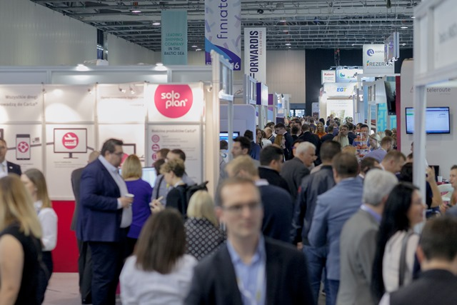 TransLogistica Poland 2018